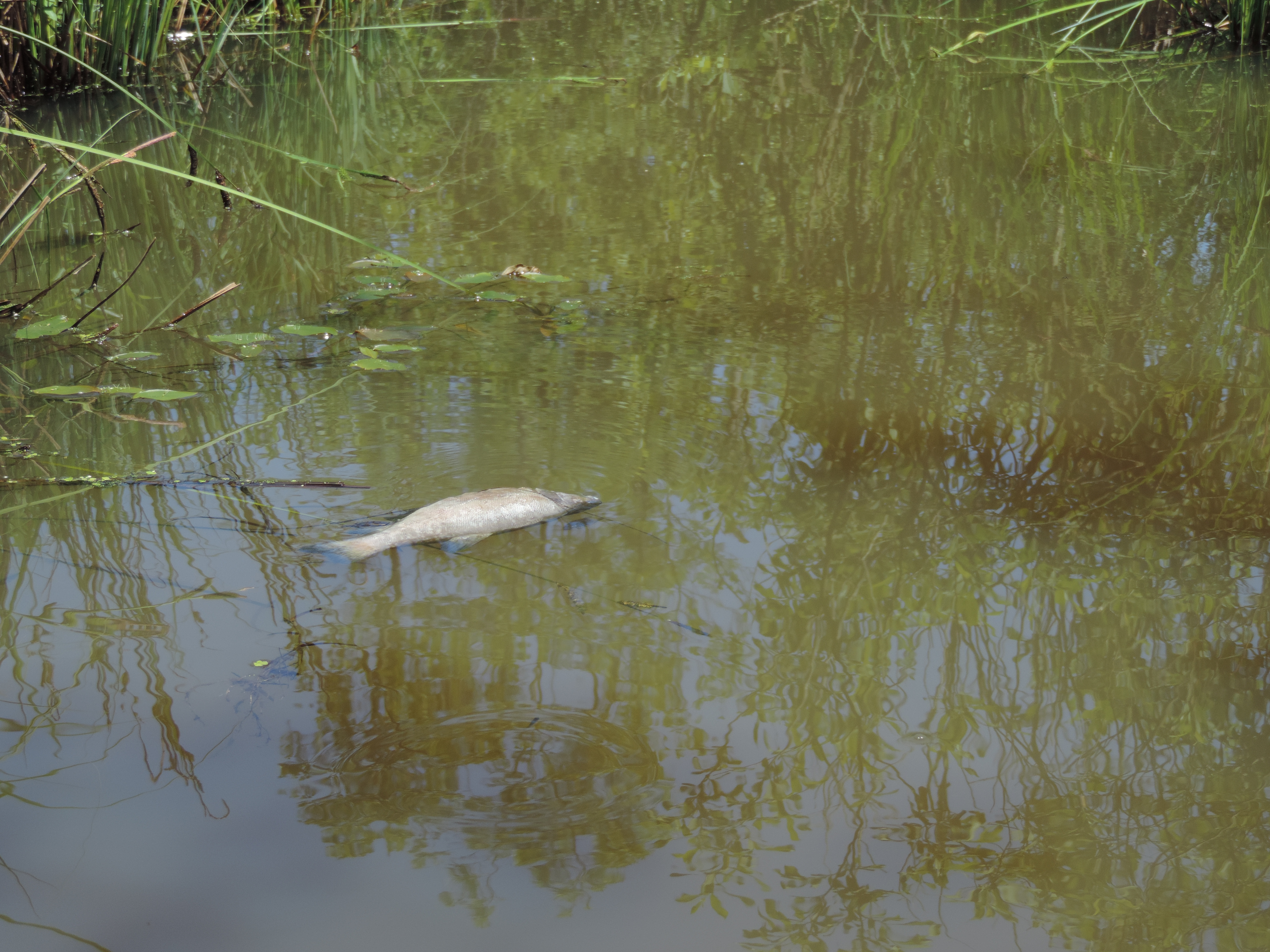 Acarlar longozu, fish death due to pollution)